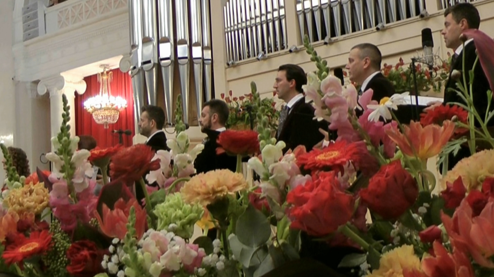 Исполнение сочинений Джона Тавенера на международном фестивале "Великопостные концерты-2013". Санкт-Петербург, 11.05.2013